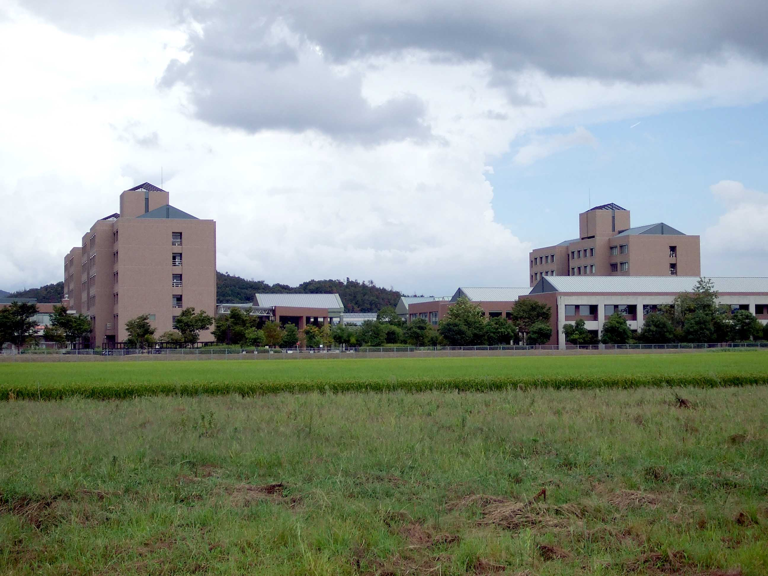 岡山県立大学。岡山県総社市。